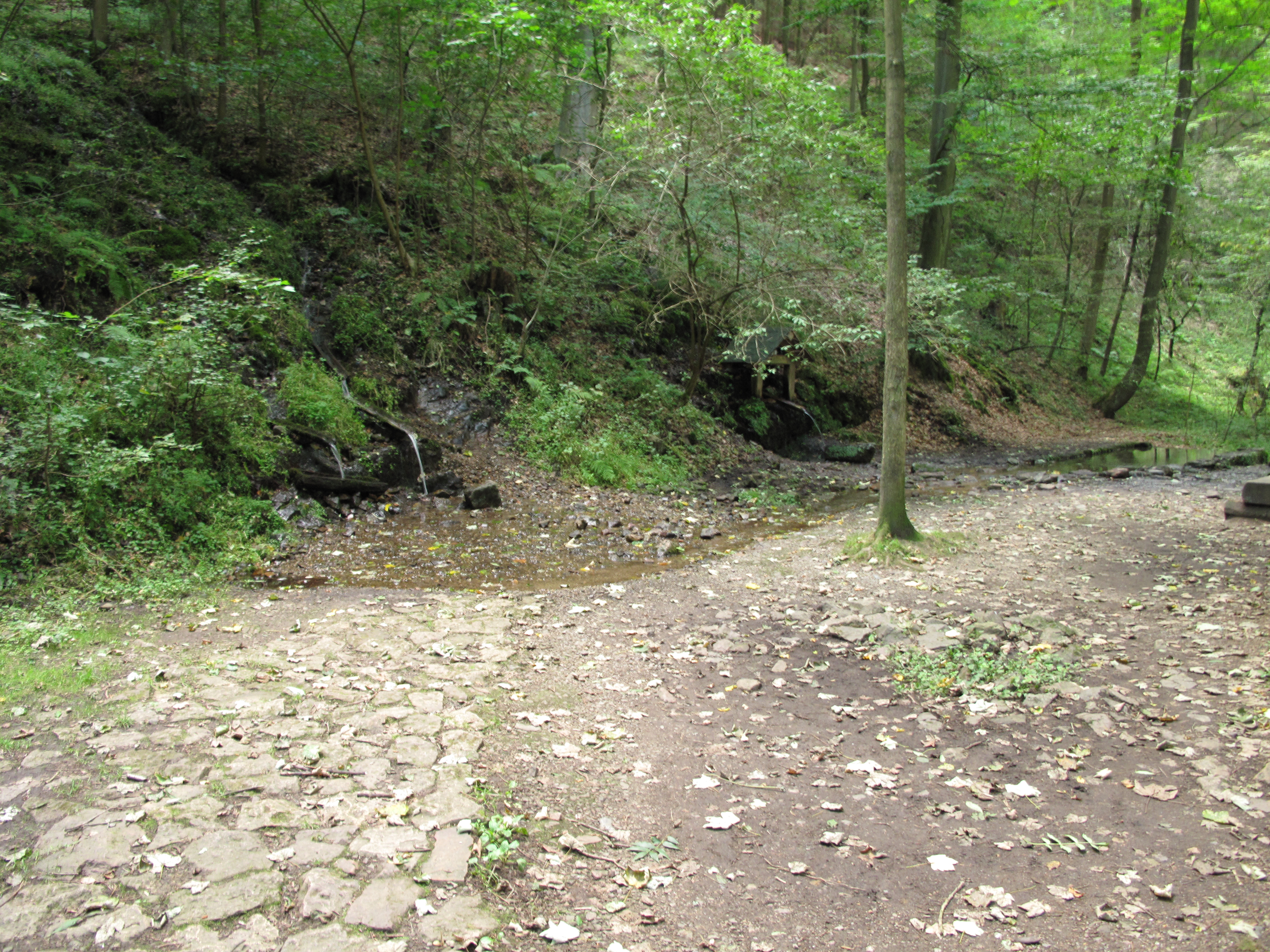 Celkový pohled na Tři Prameny. Okres Rakovník, Česká republika.